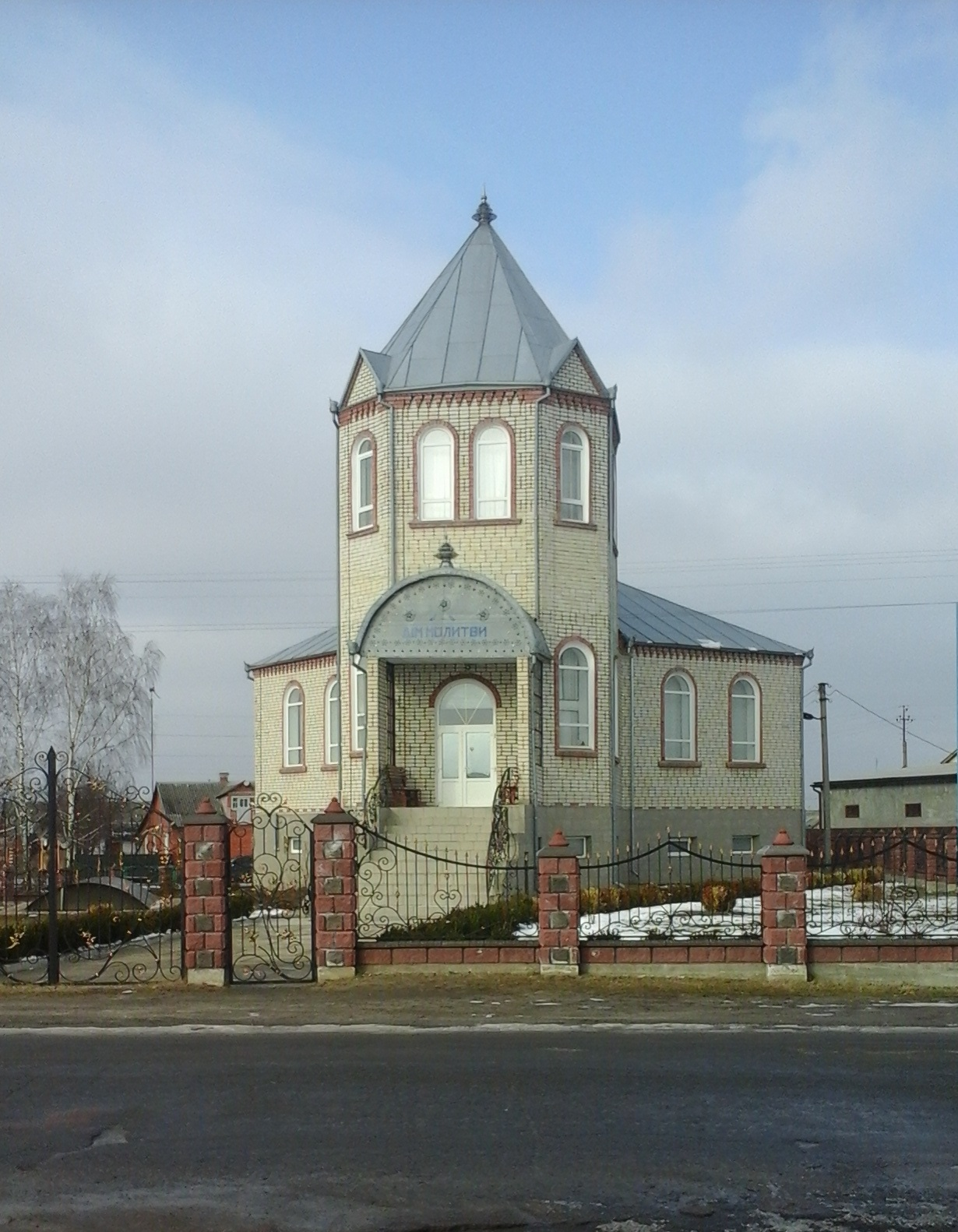 Церква євангельських християн-баптистів у м. Дубровиця, Рівненська область, Україна